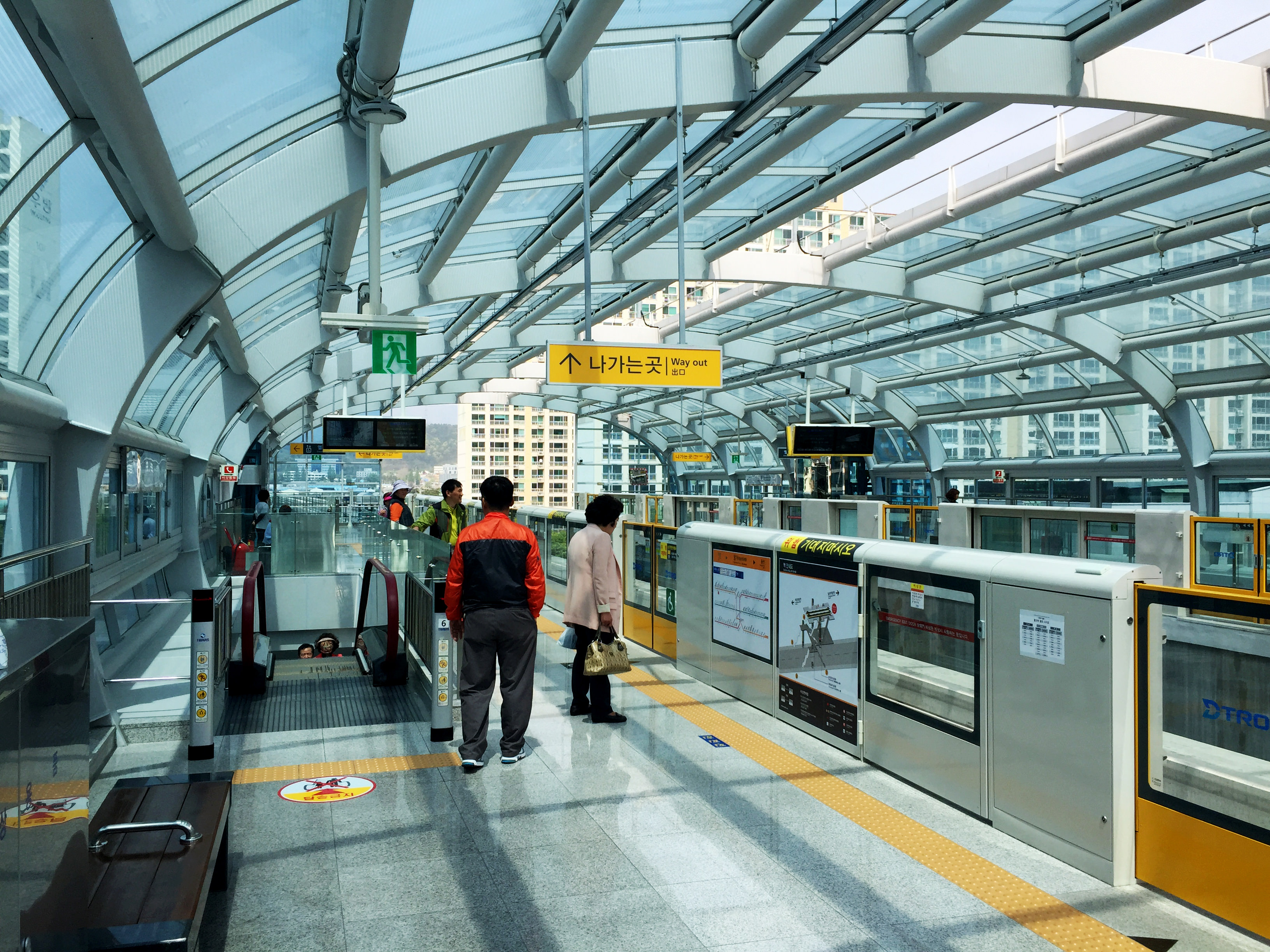 팔거(국립농관원·통계청)역 승강장